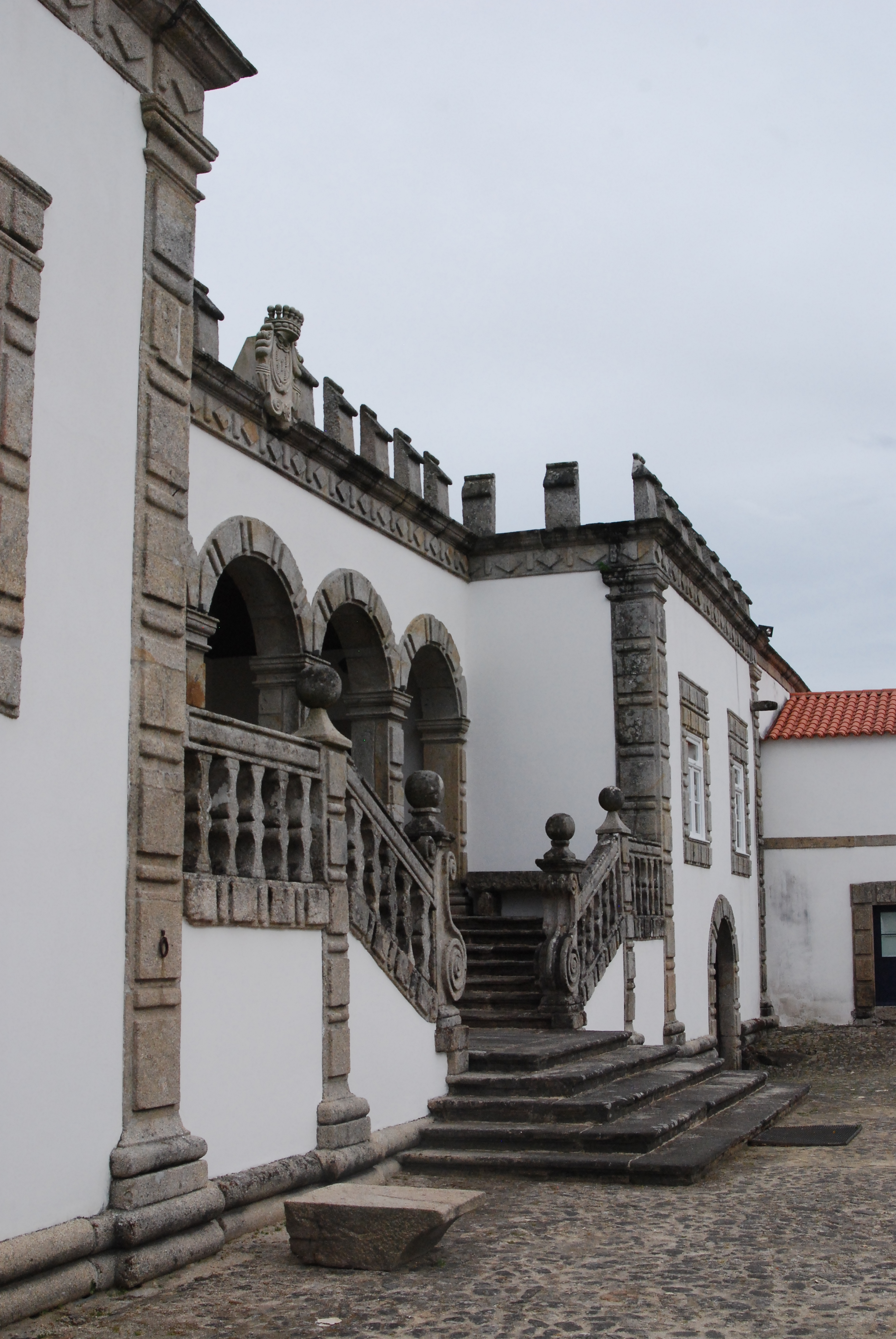 Paço Vitorino, lado